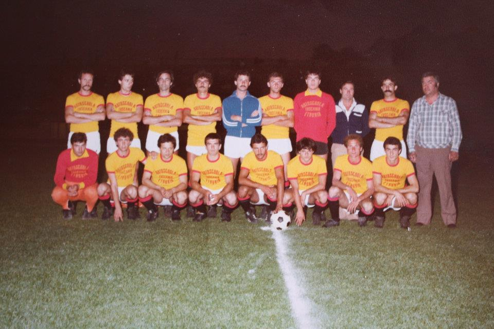 "Coppa dei Campioni" torneo estivo provinciale a Tuscania in cui parteciparono anche il fratelli Mauro Amenta e Maurizio Amenta.